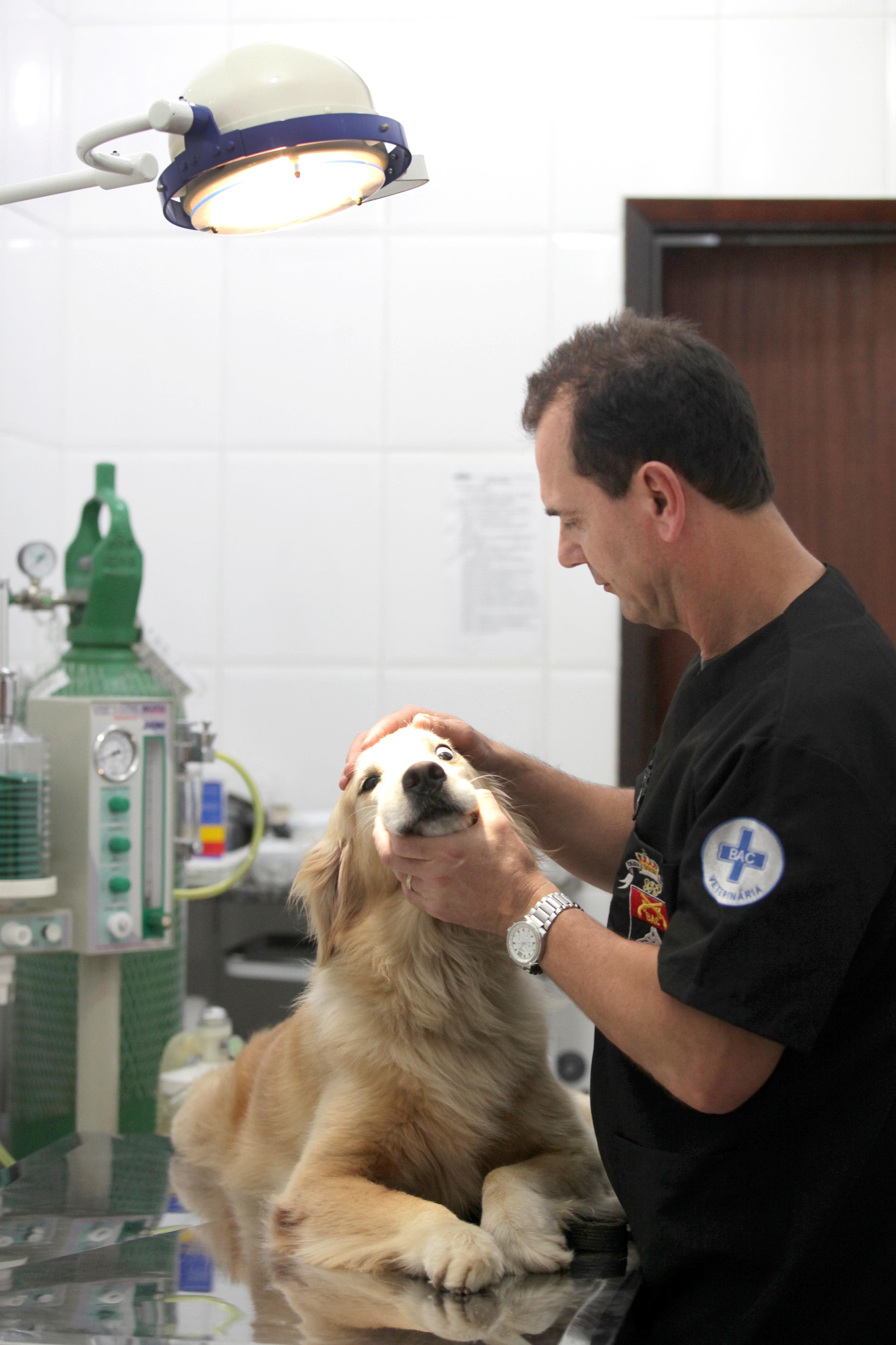 Capitão veterinário Luis Renato Veríssimo cuidando da saúde de um cão do Batalhão de Ações com Cães, no Rio de Janeiro.